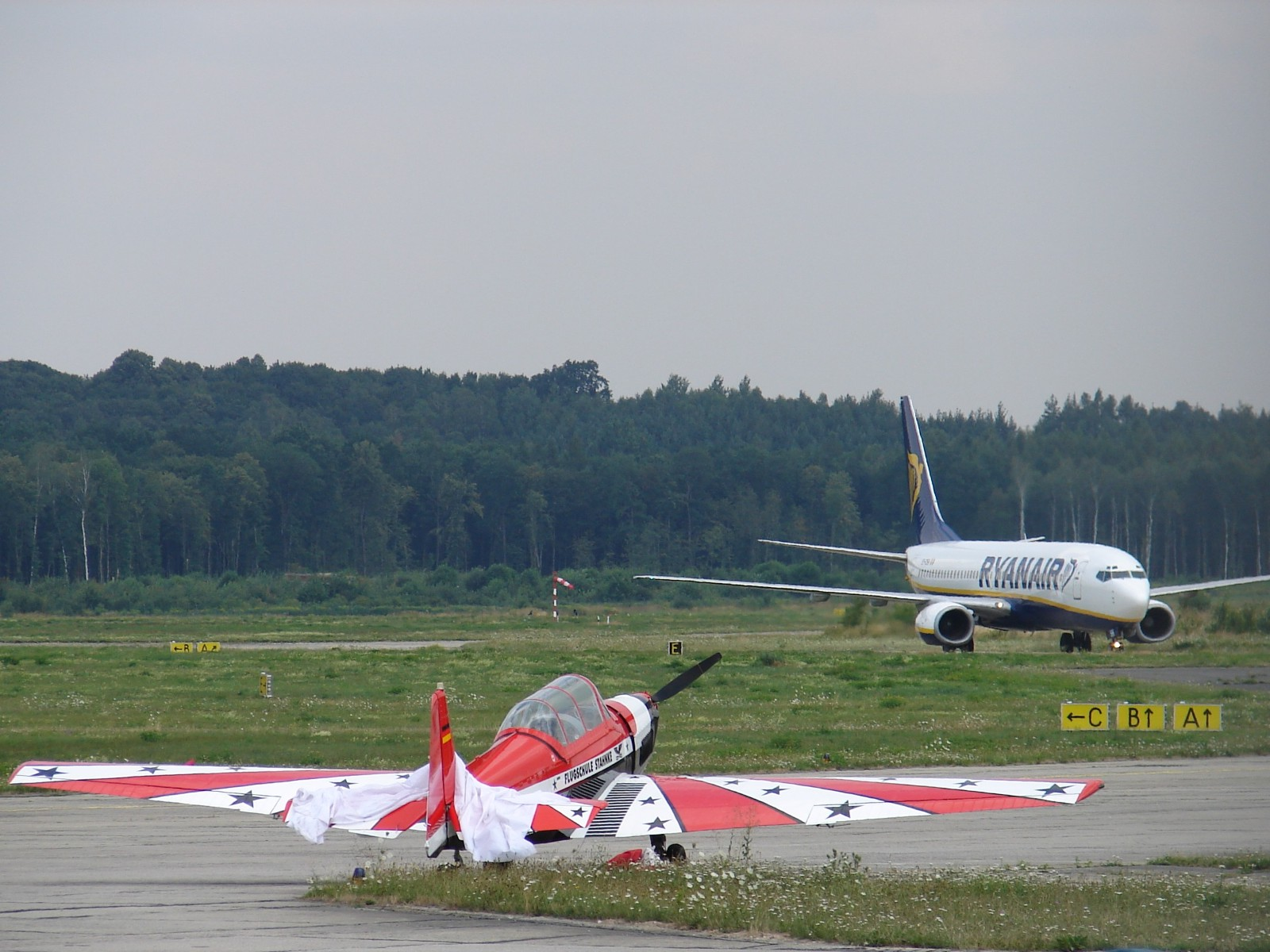 Eine B737 der Ryanair und eine Zlin 526 auf dem Flughafen Altenburg-Nobitz